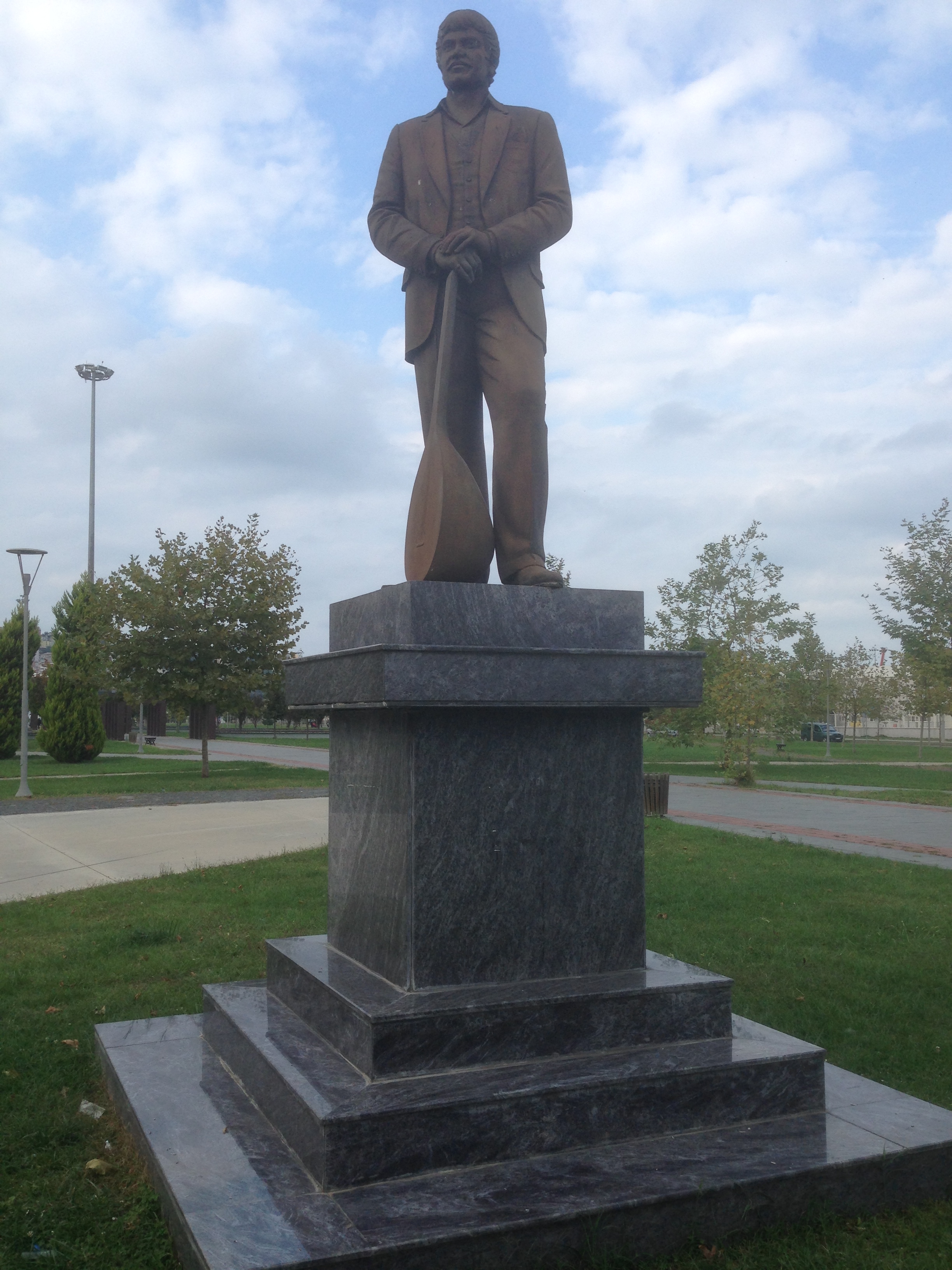 Samsun'dan çeşitli görüntüler